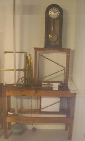 Mareograf. Instrument för registrering av havsvattenstånd. Mareografen är tillverkad efter förebild från Pola i dåvarande Österrike/Ungern. Instrumentet användes under åren 1886 till 1966. Tillverkningskostnaden 1886 var 545 kronor. Skivan med diagrampappret fungerar som lod till urverket. Vattenståndsändring överförs från flottören via stång, kedja, hjul och kuggstång till vänstra pennan. Den högra pennan markerar varje hel timme. Efter ett stadsbesök i Preussen beslöt den svenske kungen Oscar II att ett antal mareografer skulle anläggas runt den svenska kusten. Senare installerades tio mareografer inuti klassiska åttakantiga hus och användes på följande platser: Ratan, Furuögrund, Draghällan, Björn, Stockholm-Skeppsholmen, Landsort, Kungsholmsfort, Ystad, Varberg och Smögen. Vattenståndsvärdena från diagrampappren (mareogram) har överförts till digital form och lagras idag i en databas på SMHI, som idag har det nationella ansvaret för mätning av havsvattenstånd. Stationsnätet består idag av 23 stationer längs den svenska kusten.